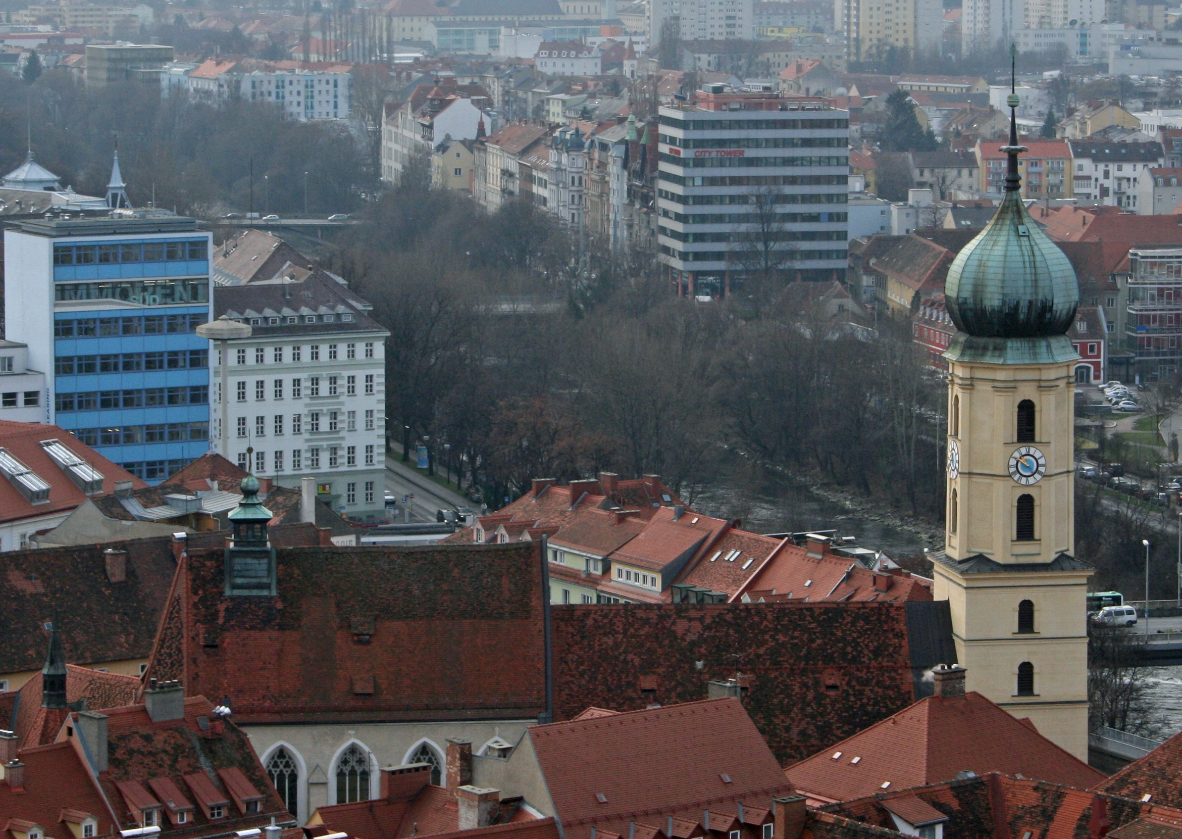 Franziskanerkirche, gesehen vom Grazer Schloßberg (Graz, Austria)